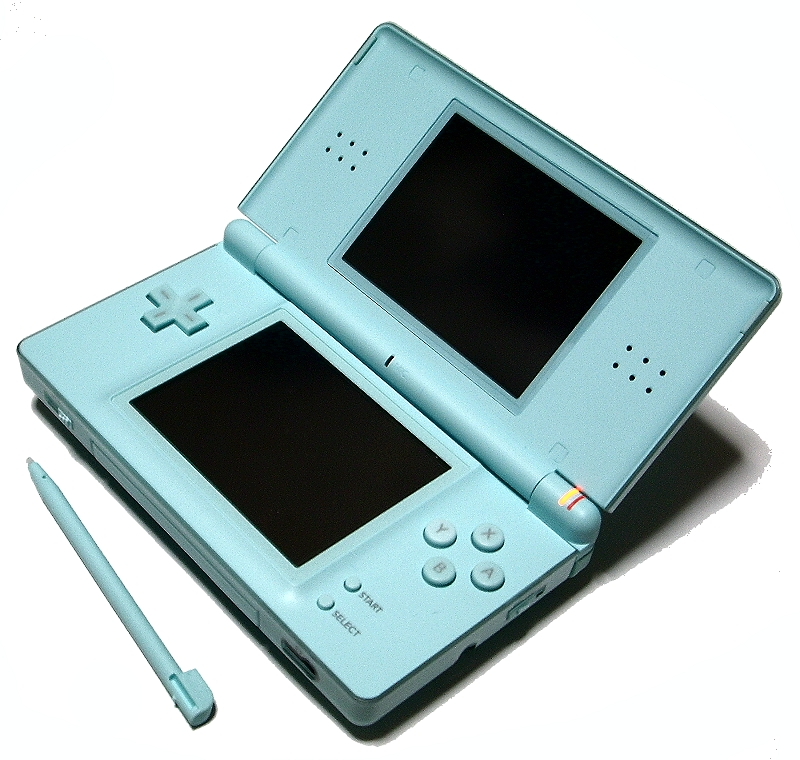 Nintendo DS Lite Ice Blue(ニンテンドーDS Lite アイスブルー)